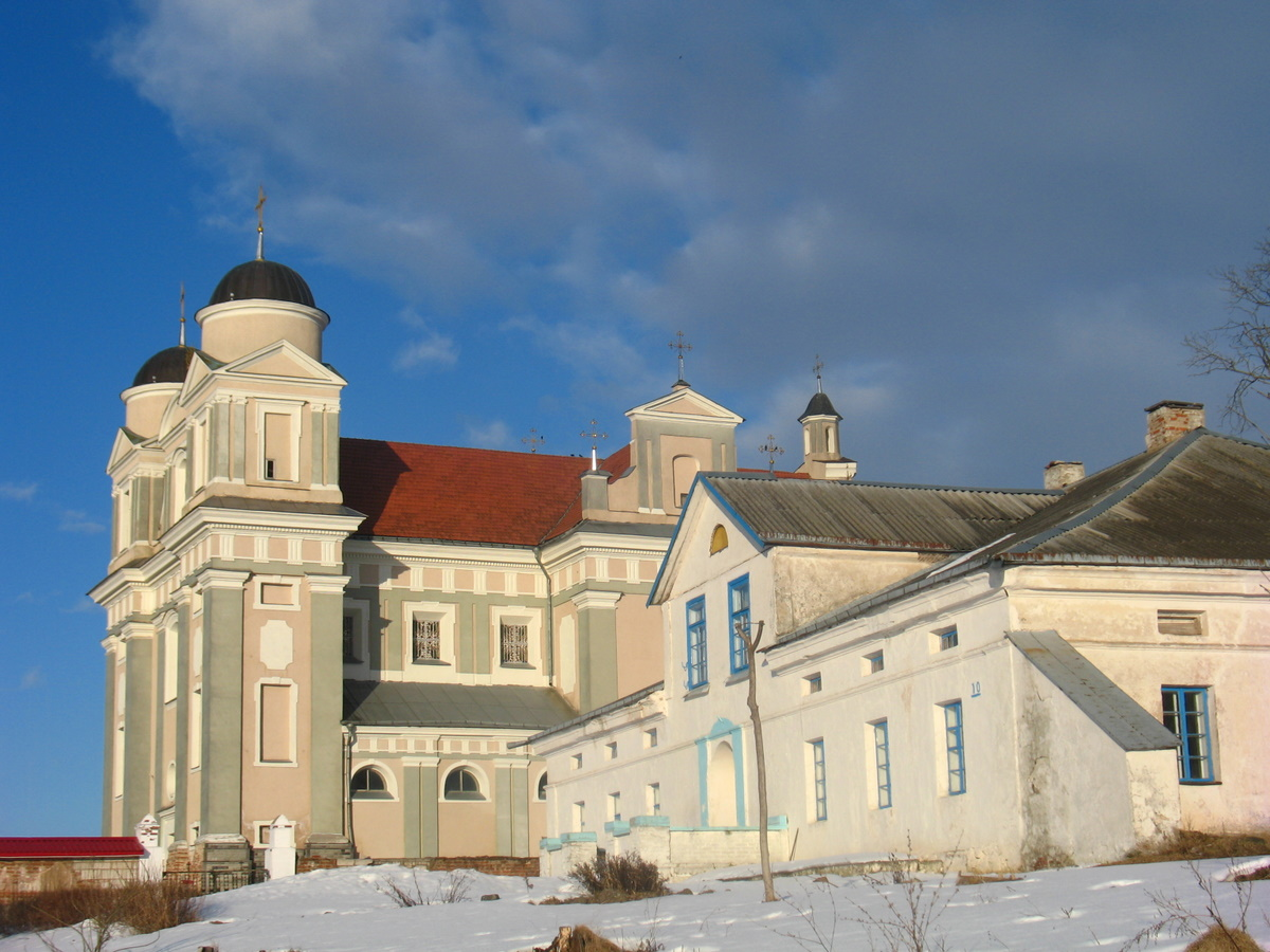 Беларуская (тарашкевіца): Лучай